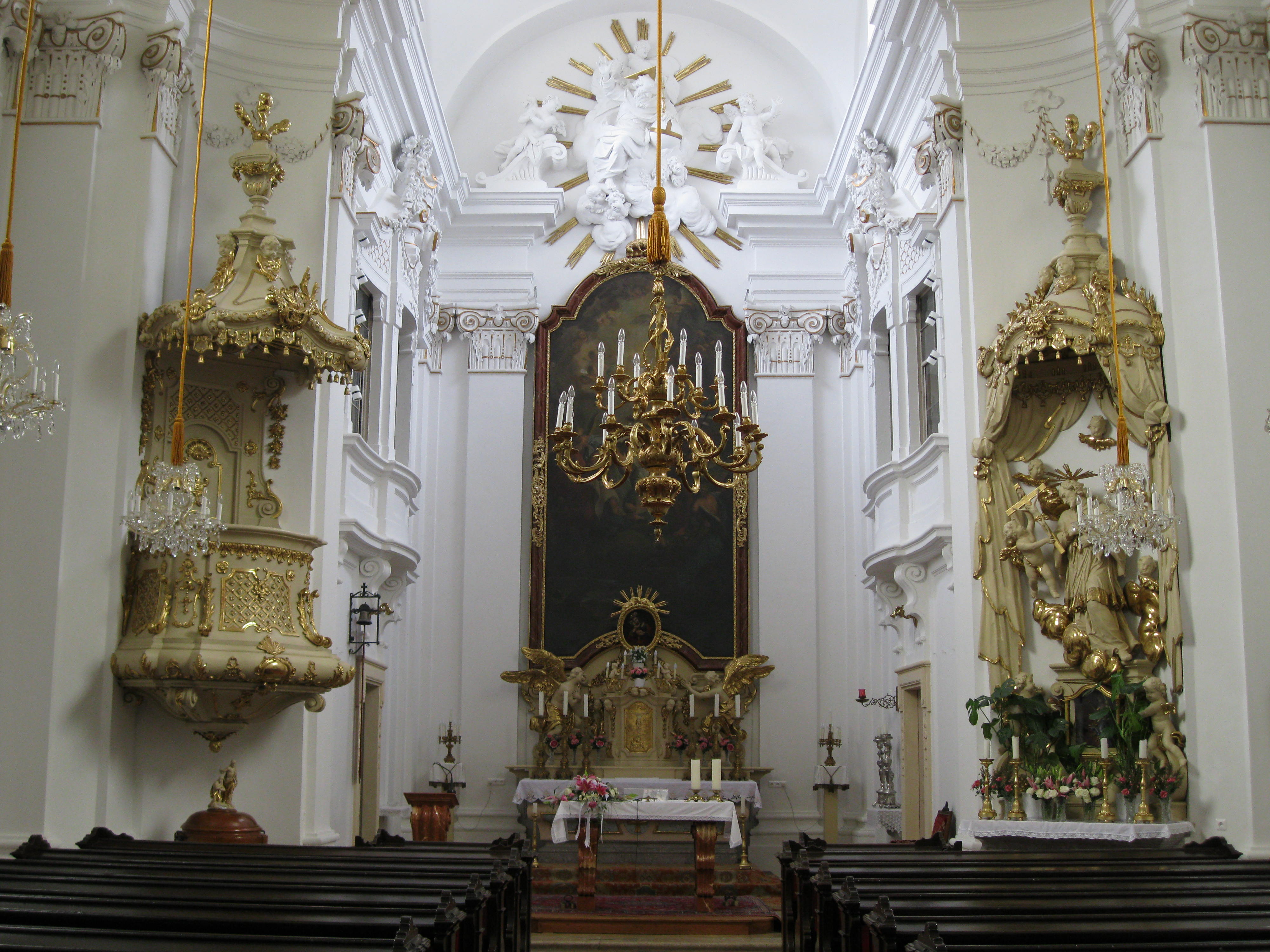 Innenraum der Bergkirche Rodaun, Wien 23